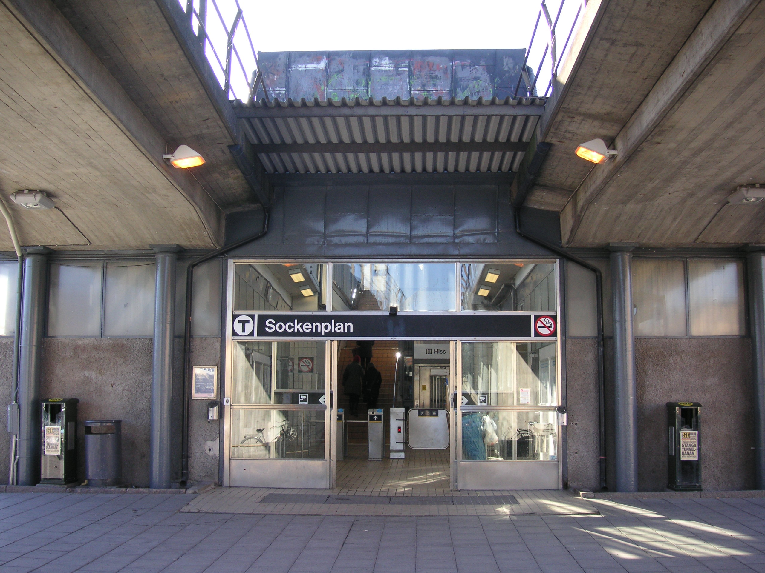 Sockenplan, T-bana, Stockholm